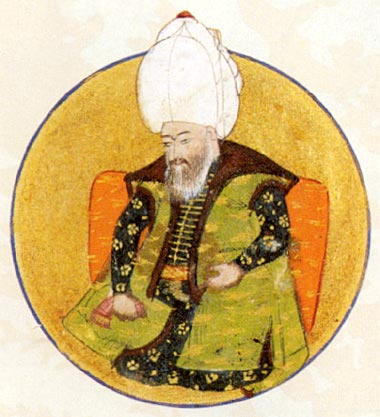 Sultan Bayezid II "the Holy" (Veli). Ottoman miniature painting, located at Topkapı Sarayı Müzesi, Istanbul (Inv. H 1324, Fol. 29v)